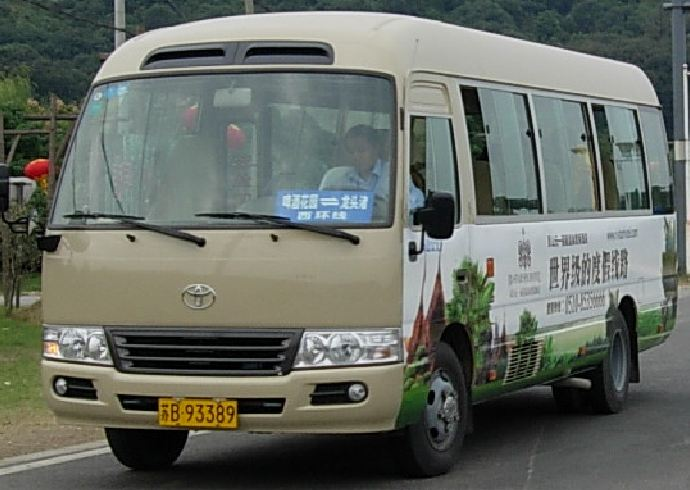 無錫馬山公交の中型バス中文（中国大陆）: 无锡马山公交的中巴